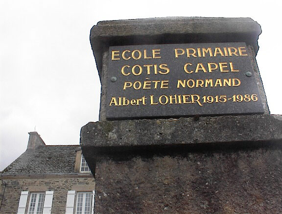 Eune êcole prînmaithe à Bieaumont Hague nommée pouor Côtis-Capel, auteu Nouormand